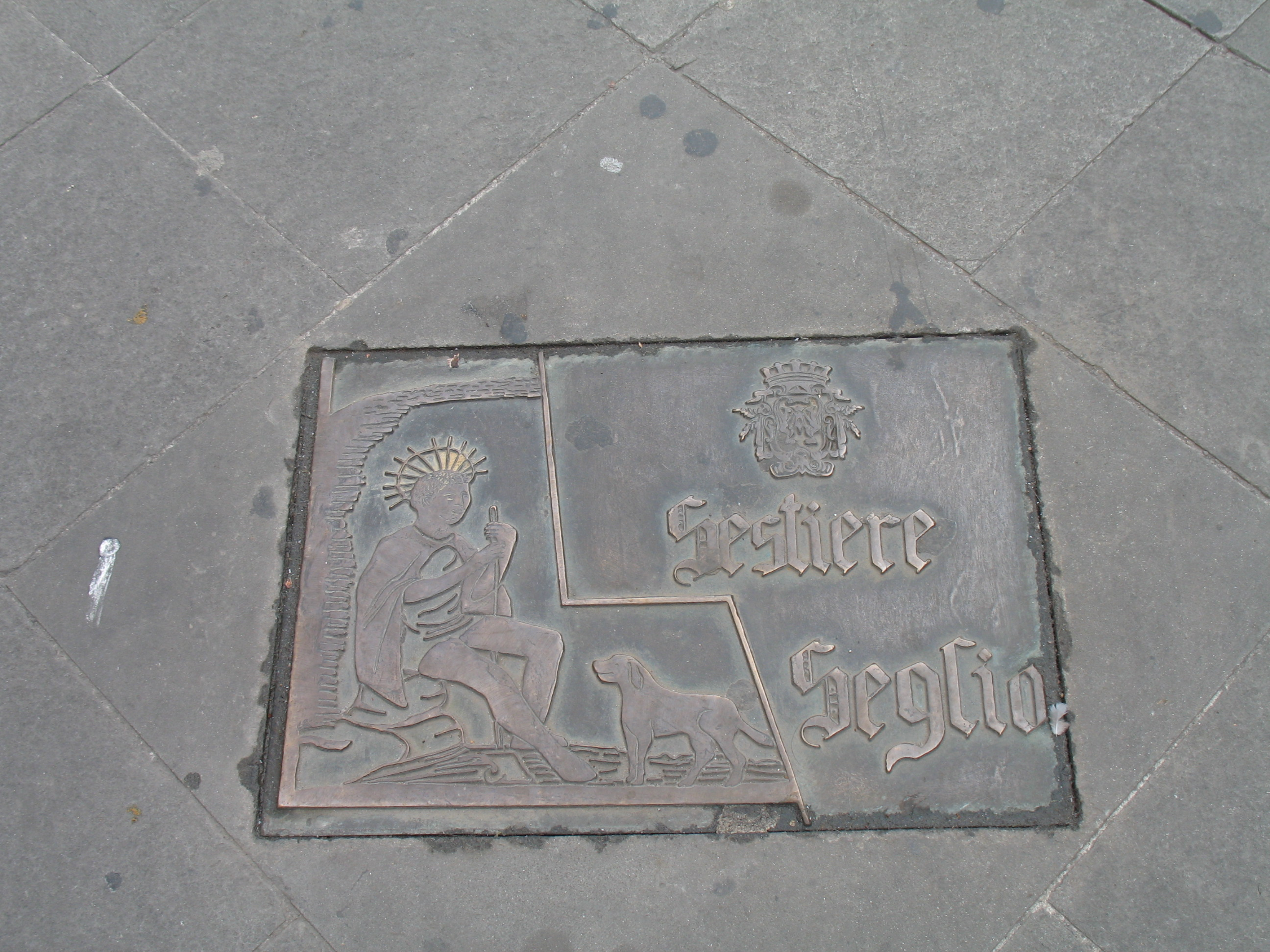 Serie di Immagini da Rapallo e San Michele di Pagana (Rapallo), in provincia di Genova